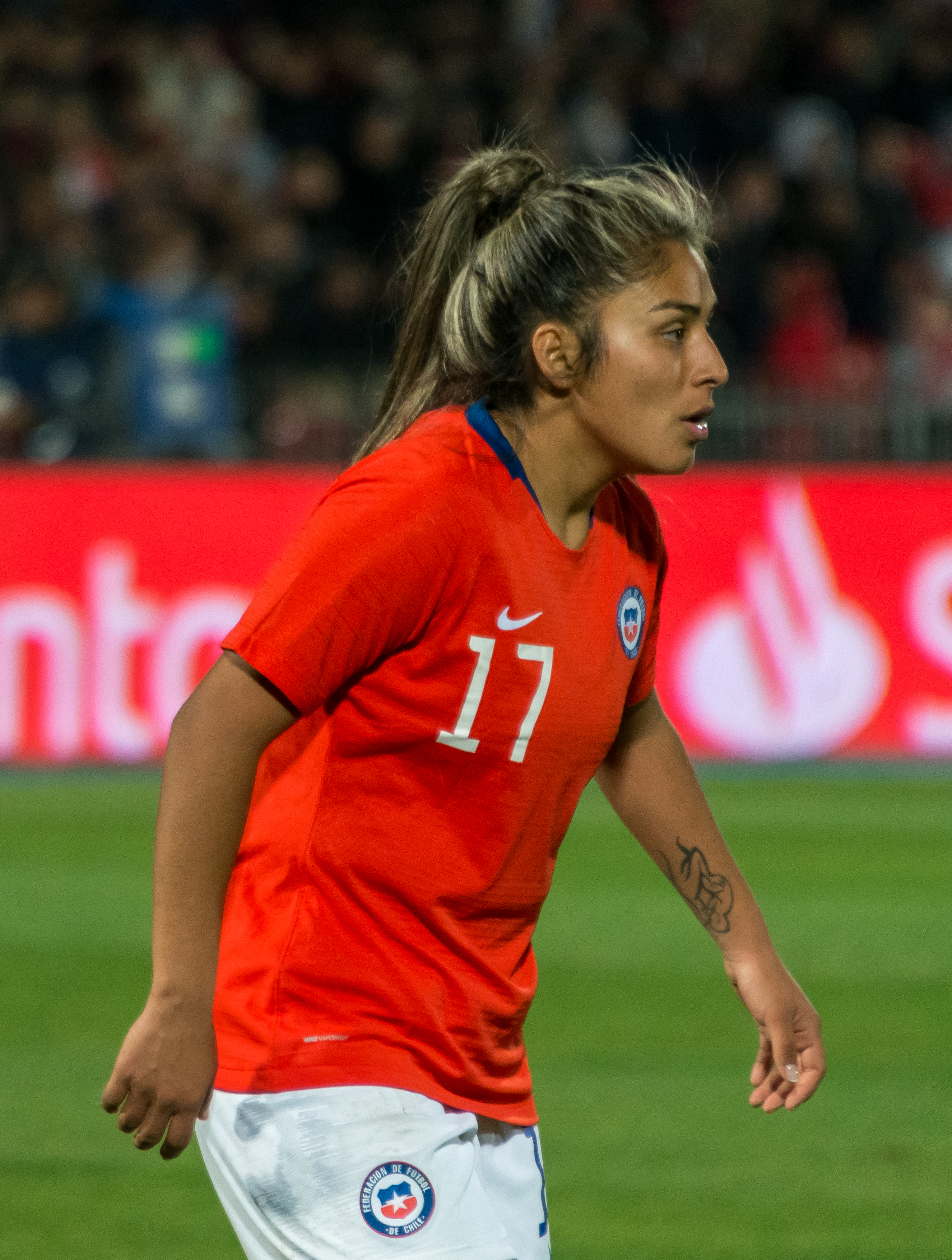 Javiera Toro, Chile v Colombia, Estadio Nacional, Ñuñoa, Santiago, Chile.